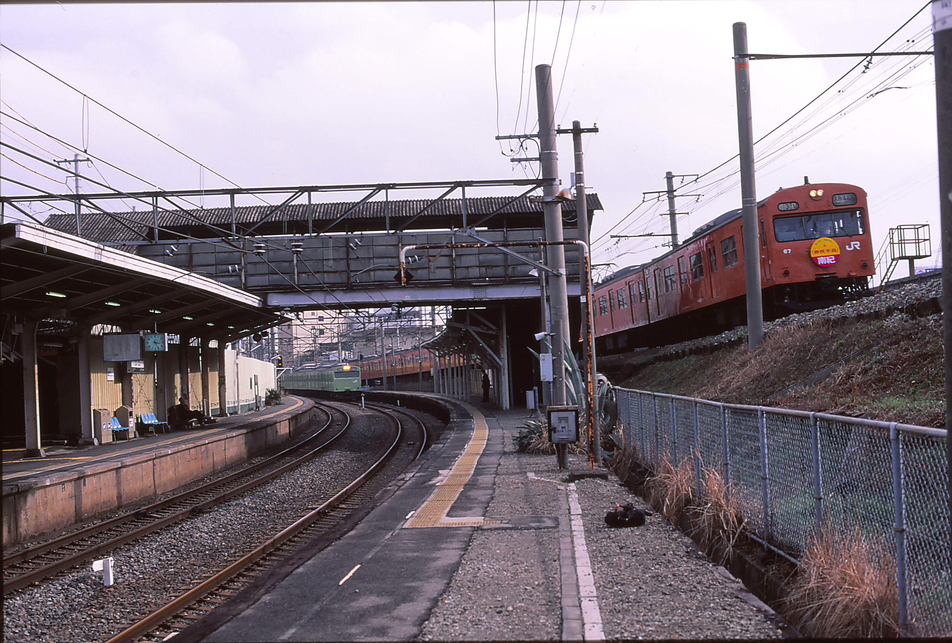 関西本線旧今宮駅 右は大阪環状線外回り。JR今宮駅1996年